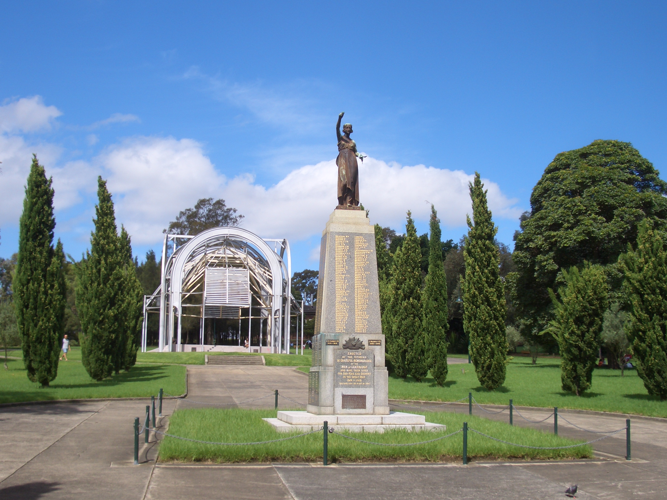 Leichhardt, Pioneers Memorial Park